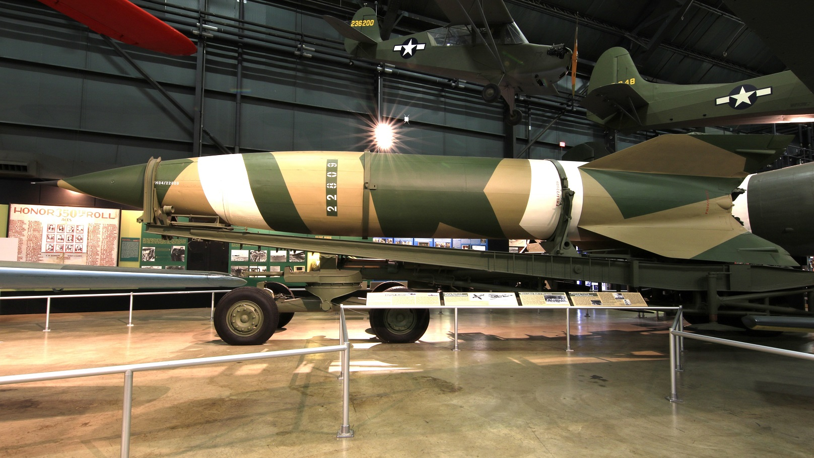 V-2 with Meillerwagen / National Museum of the U.S. Air Force / 2015年7月26日撮影